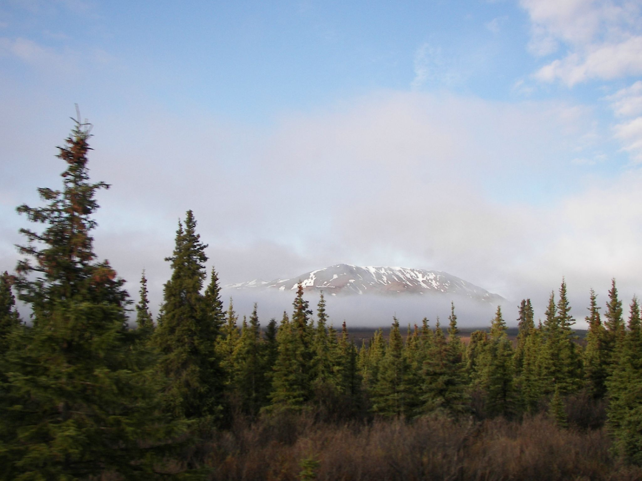 Taiga Forest, Alaska.